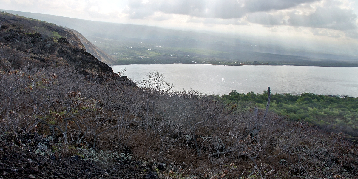 Иллюcтрация для викиучебника Гавайеведение